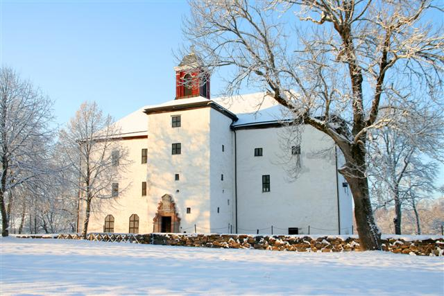 Foto: Tor Svensson